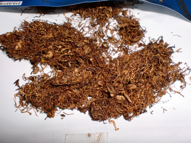 Tabak zum "drehen"